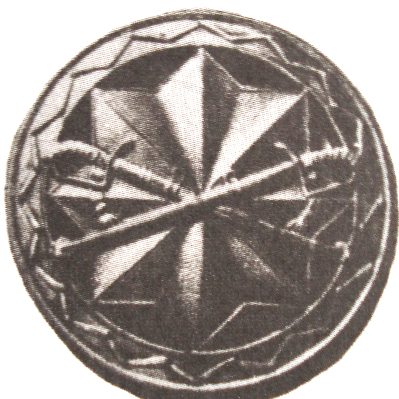 Znak oficerski "Parasol"